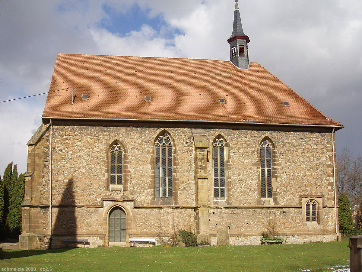 Cornelienkirche in Bad Wimpfen, Südfassade